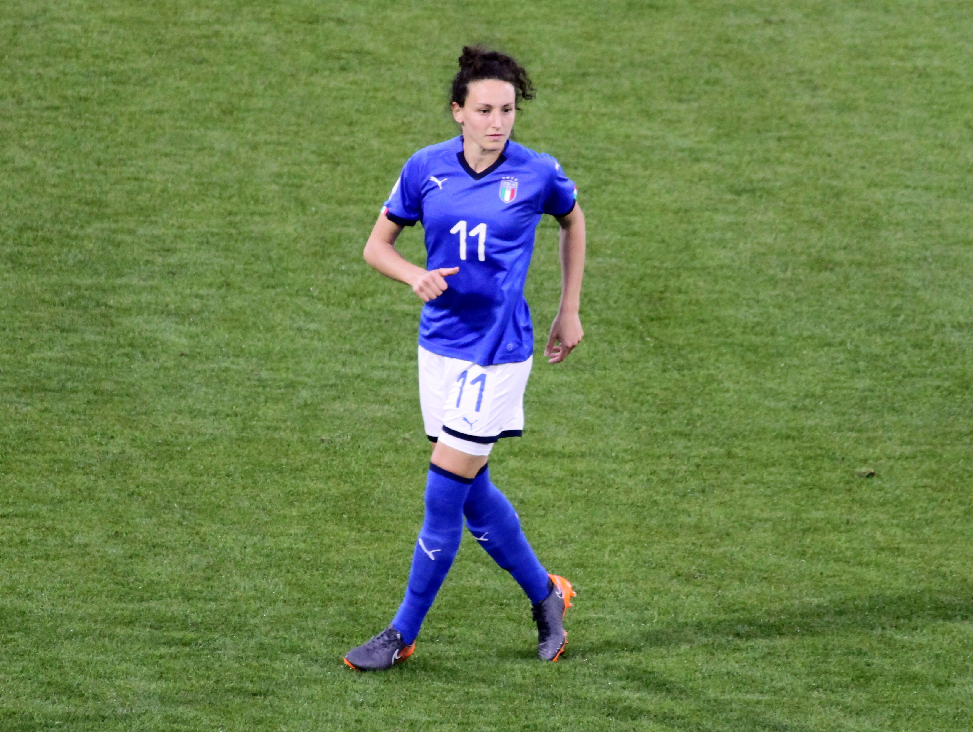 Ilaria Mauro, attaccante della nazionale di calcio femminile dell'Italia, durante l'incontro Italia-Belgio del 10 aprile 2018 allo stadio Paolo Mazza di Ferrara.